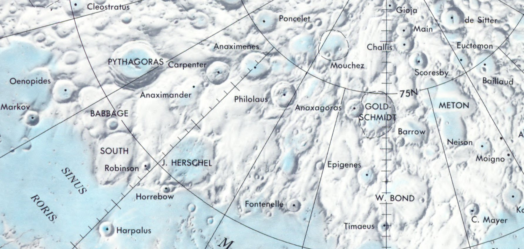 Cráter lunar South. Localización. (Lunar Chart LPC1. Second Edition)